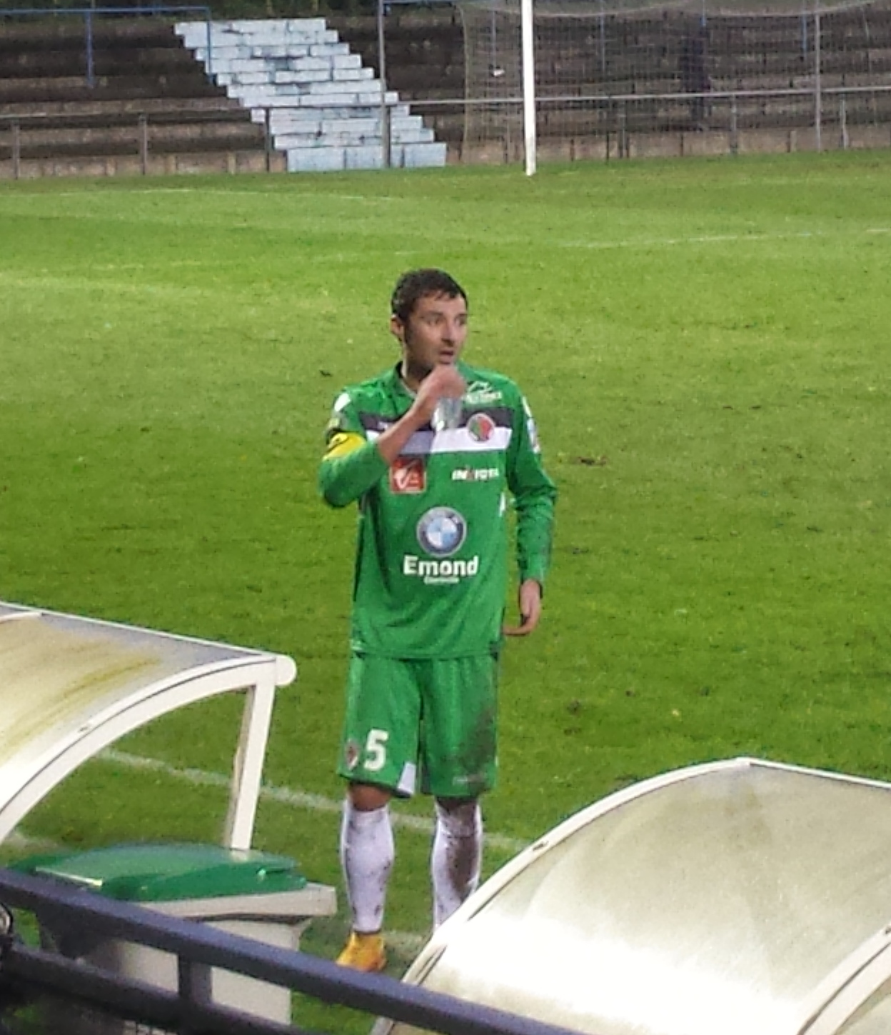 Damien Dufour lors du match Lens B - Sedan, au Stade François-Blin d'Avion, match comptant pour le championnat de France de CFA (quatrième division française), le 24 janvier 2015.